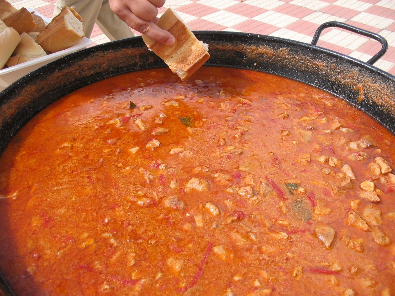 Comiendo la Caldereta